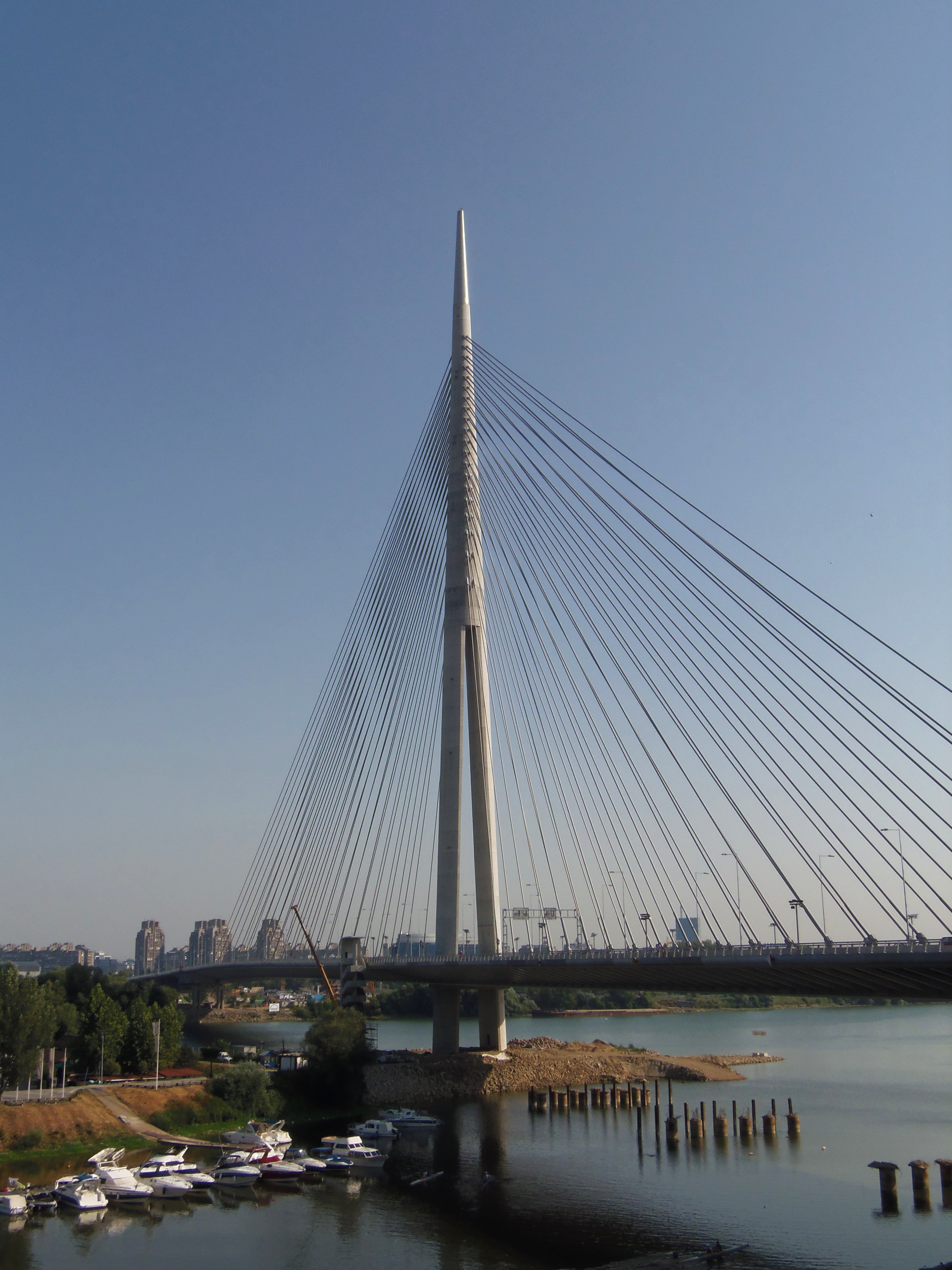 Пилон моста на ади, јул 2012.